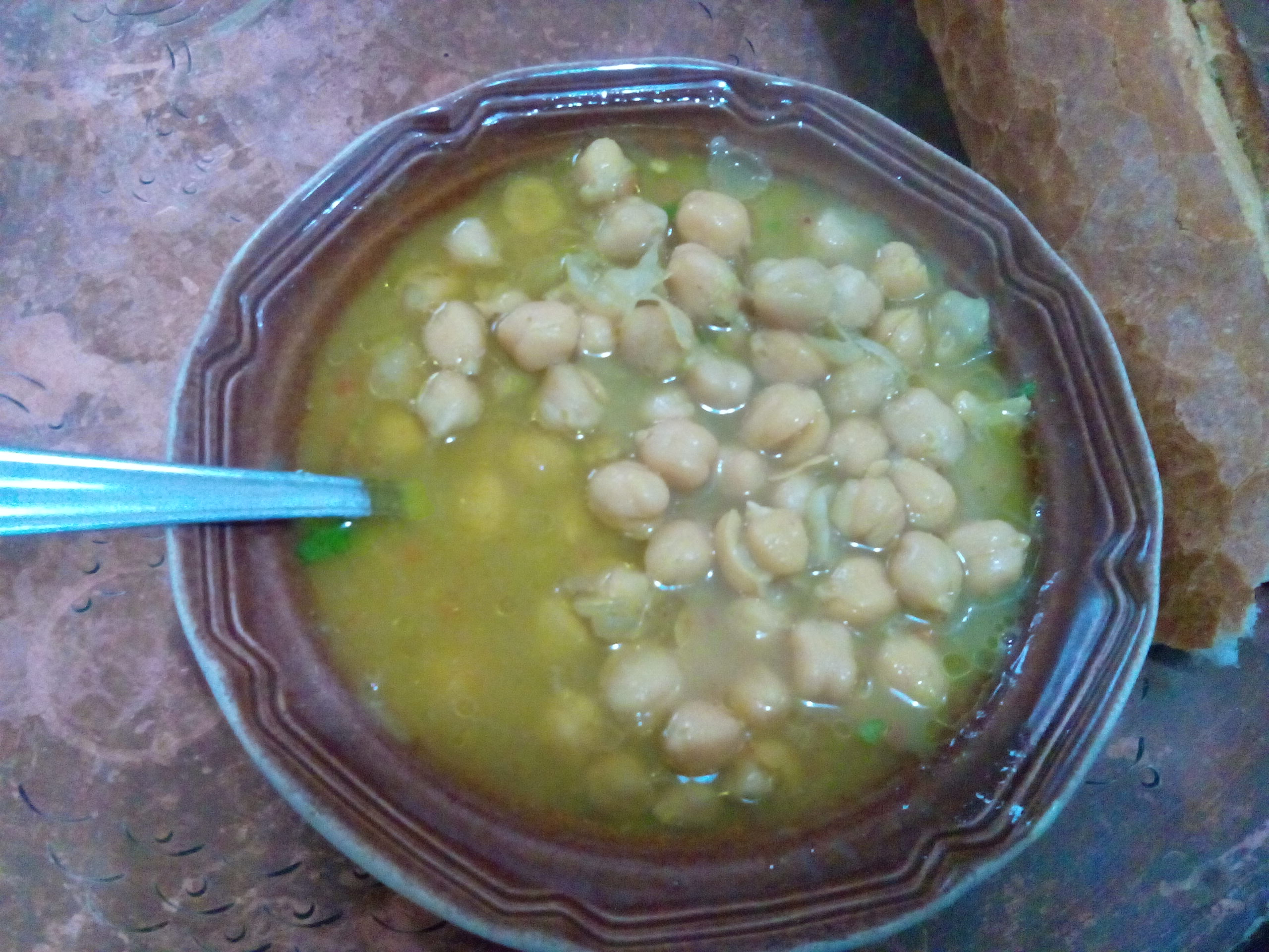 Dobara dans la ville de Batna